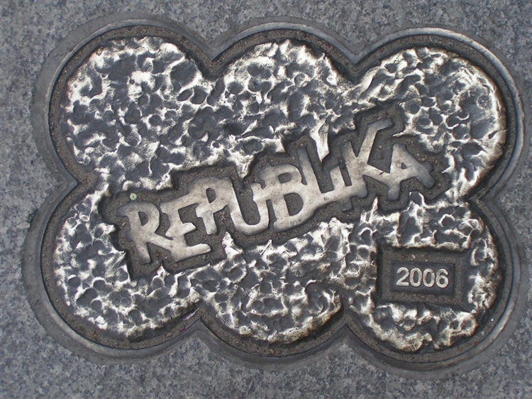 Piernik upamiętniający toruński zespół muzyczny Republika